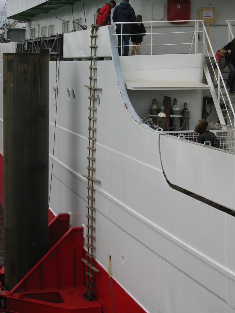 Sztormtrap (drabinka pilotowa) przy burcie drobnicowca MS Cap San Diego - Hamburg